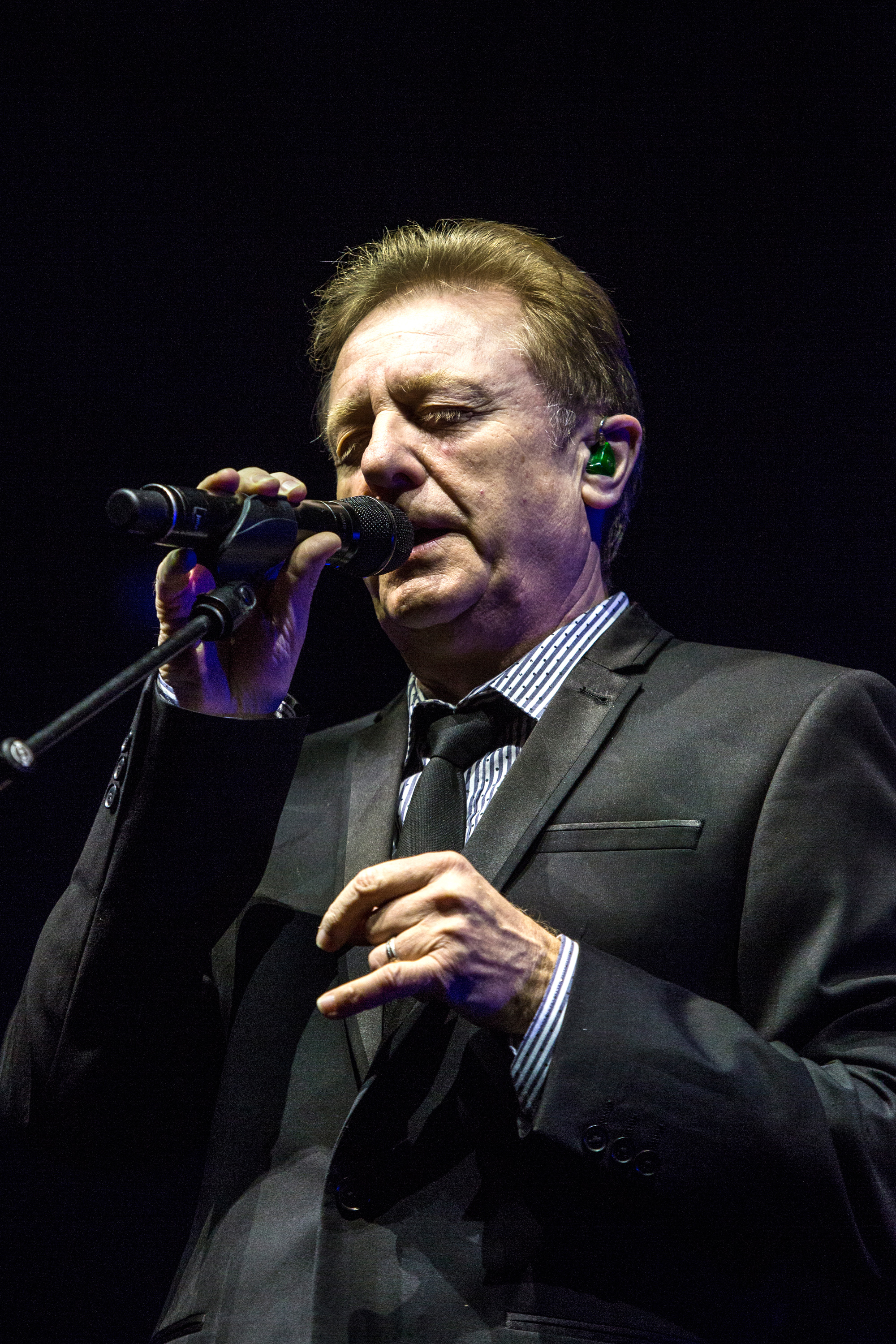 Der britische Musiker John Miles bei der AIDA Night of the Proms 2013 in der Festhalle Frankfurt.